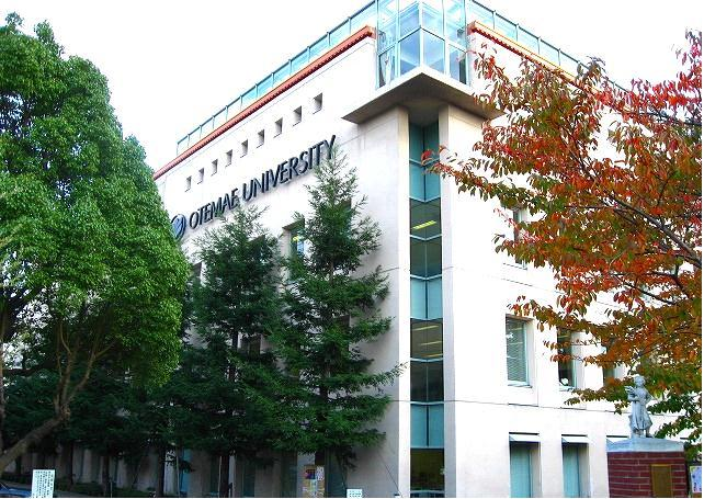 本館